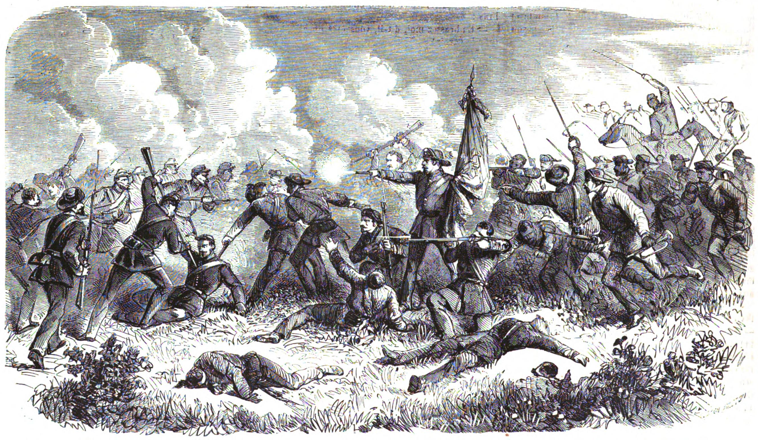 GUERRE DE L'AMÉRIQUE DU SUD. - COMBAT DE SAM-BORJA (10 juin 1865); le 1º bataillon de volontaires brésiliens deféndants son drapeau contre les Paraguayens. - D'après un croquis de M. Mynssen